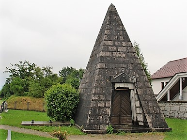 Grobnica družine Haupt na Gomilskem pokopališču.